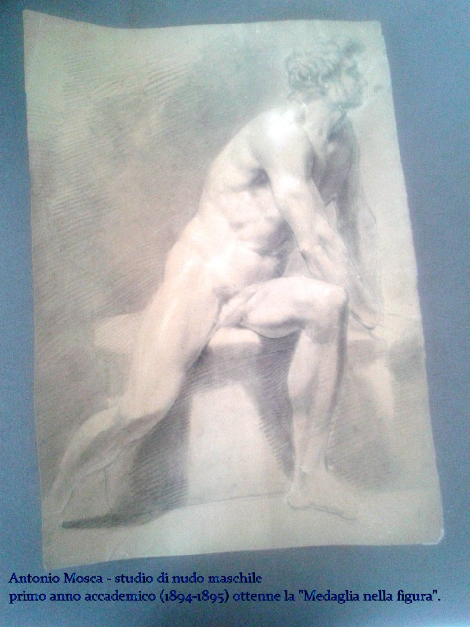 opera del primo anno accademico delle Belle Arti di Bologna (1894-1895) per cui è stata assegnata la Medaglia per la figura a Antonio Mosca